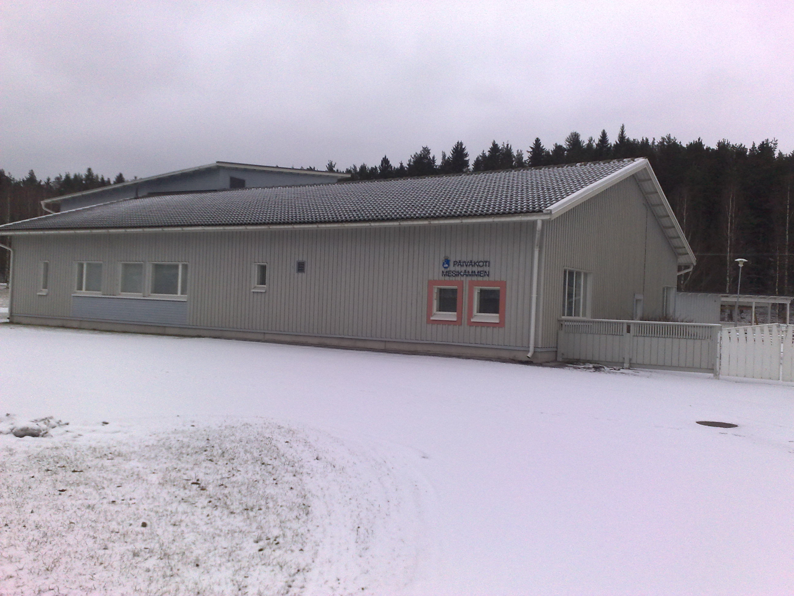 Päiväkoti Mesikämmen Salossa.